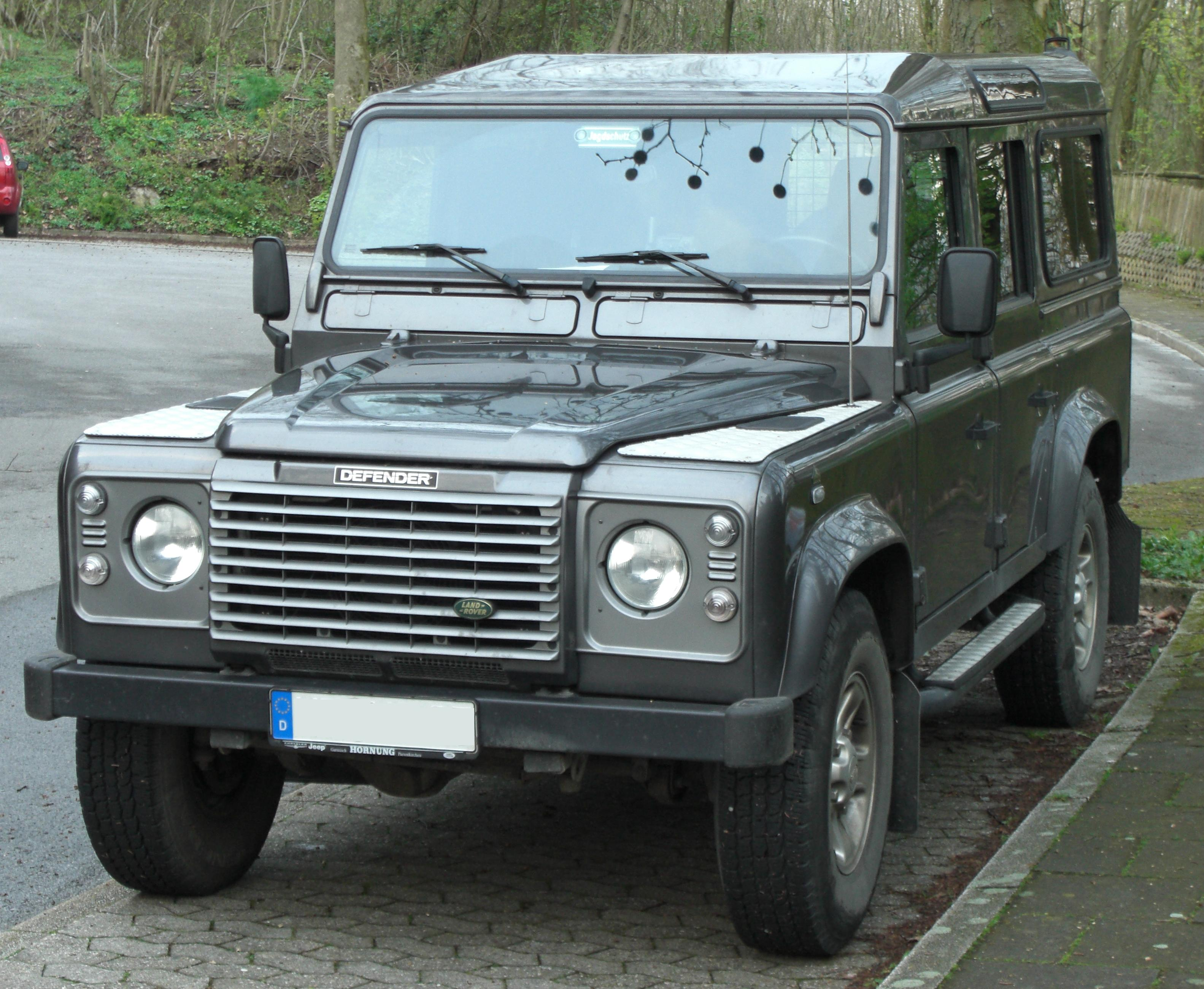 Land Rover Defender